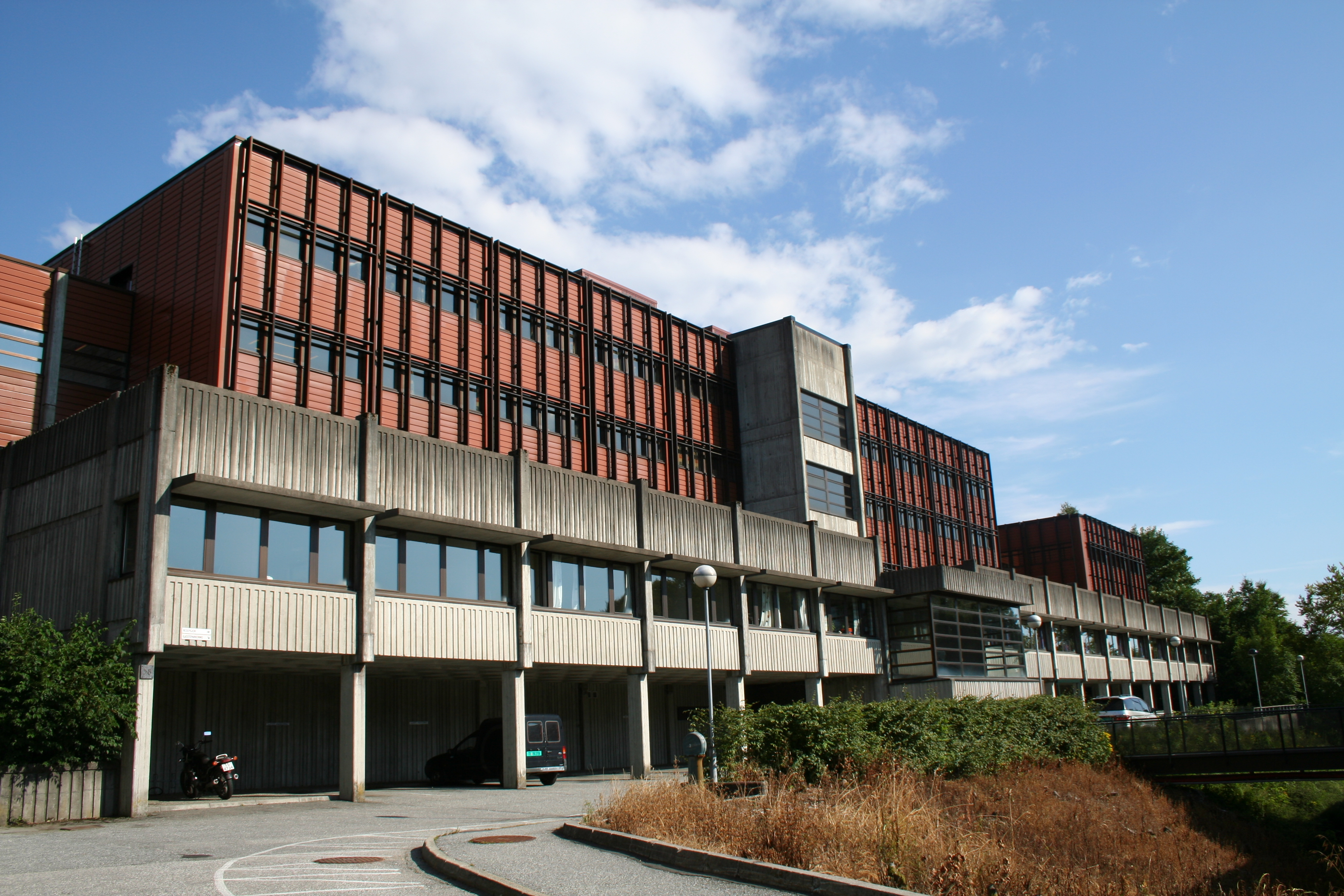 The Christian Michelsen Institute in Bergen, Norway.